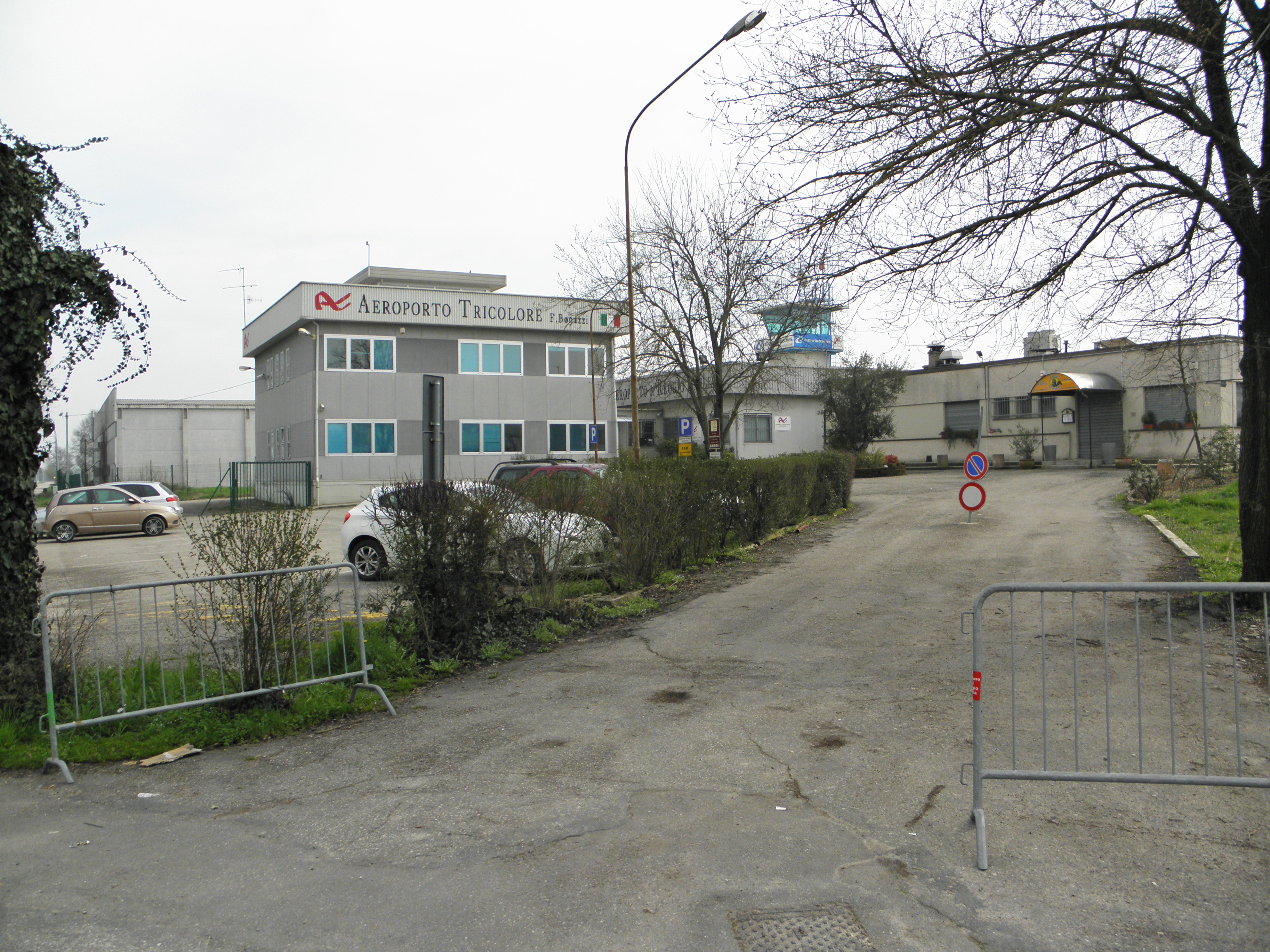 Parte delle strutture dell'aeroporto "Tricolore F. Bonazzi" di Reggio nell'Emilia.